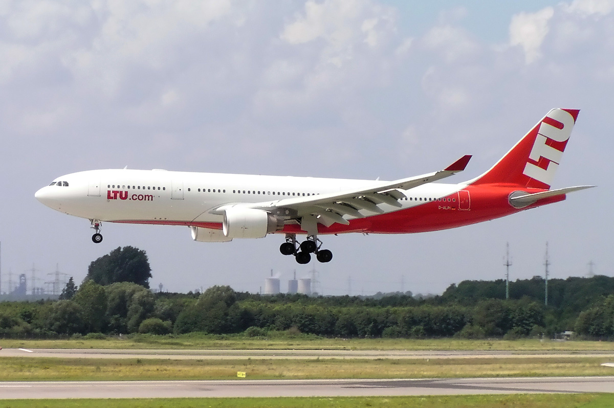 LTU Airbus A330-200 D-ALPI in Düsseldorf (EDDL)